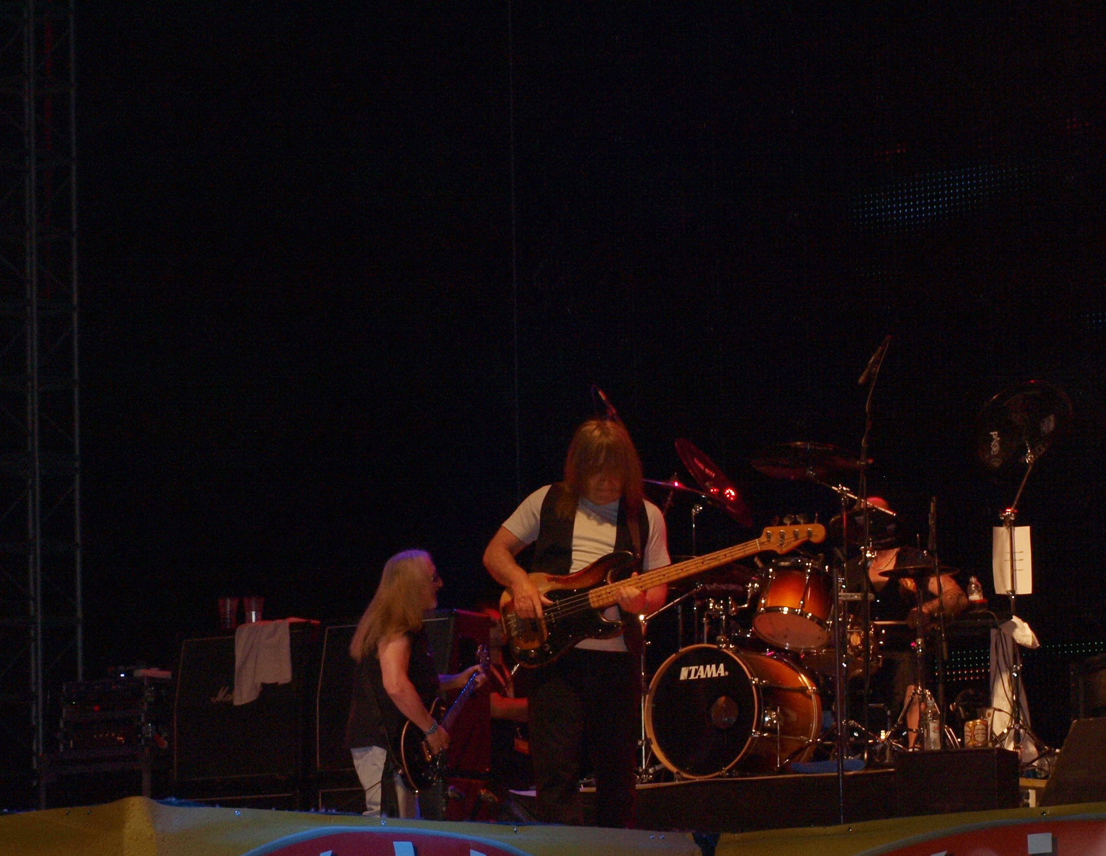 Uriah Heep na Mega Bikers susretima u Slavonskom Brodu, 9. svibnja 2009. godine.